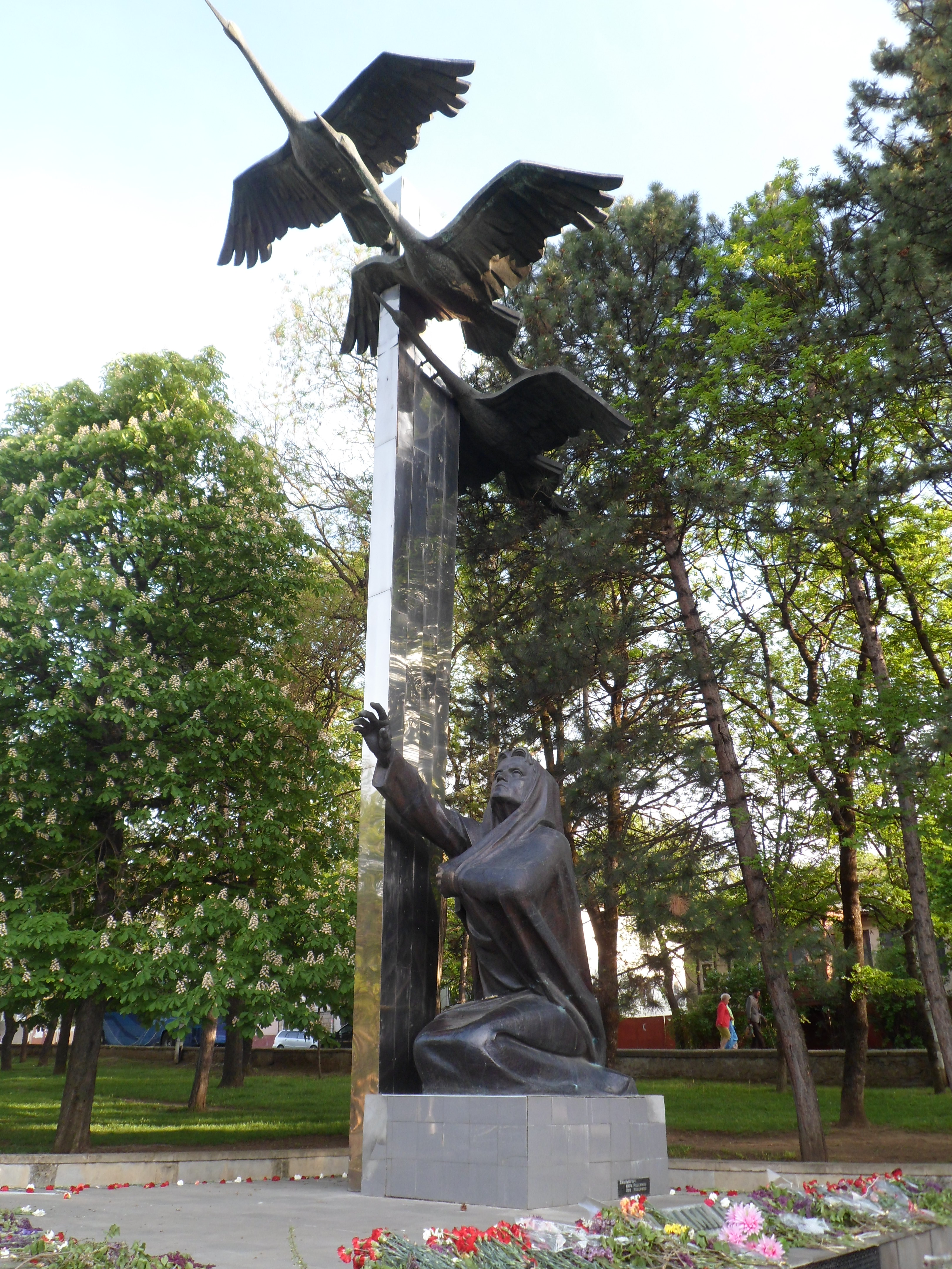 Кисловодский национальный парк: Кисловодск, Ставропольский край This image is related to the protected area of Russia number 2600208